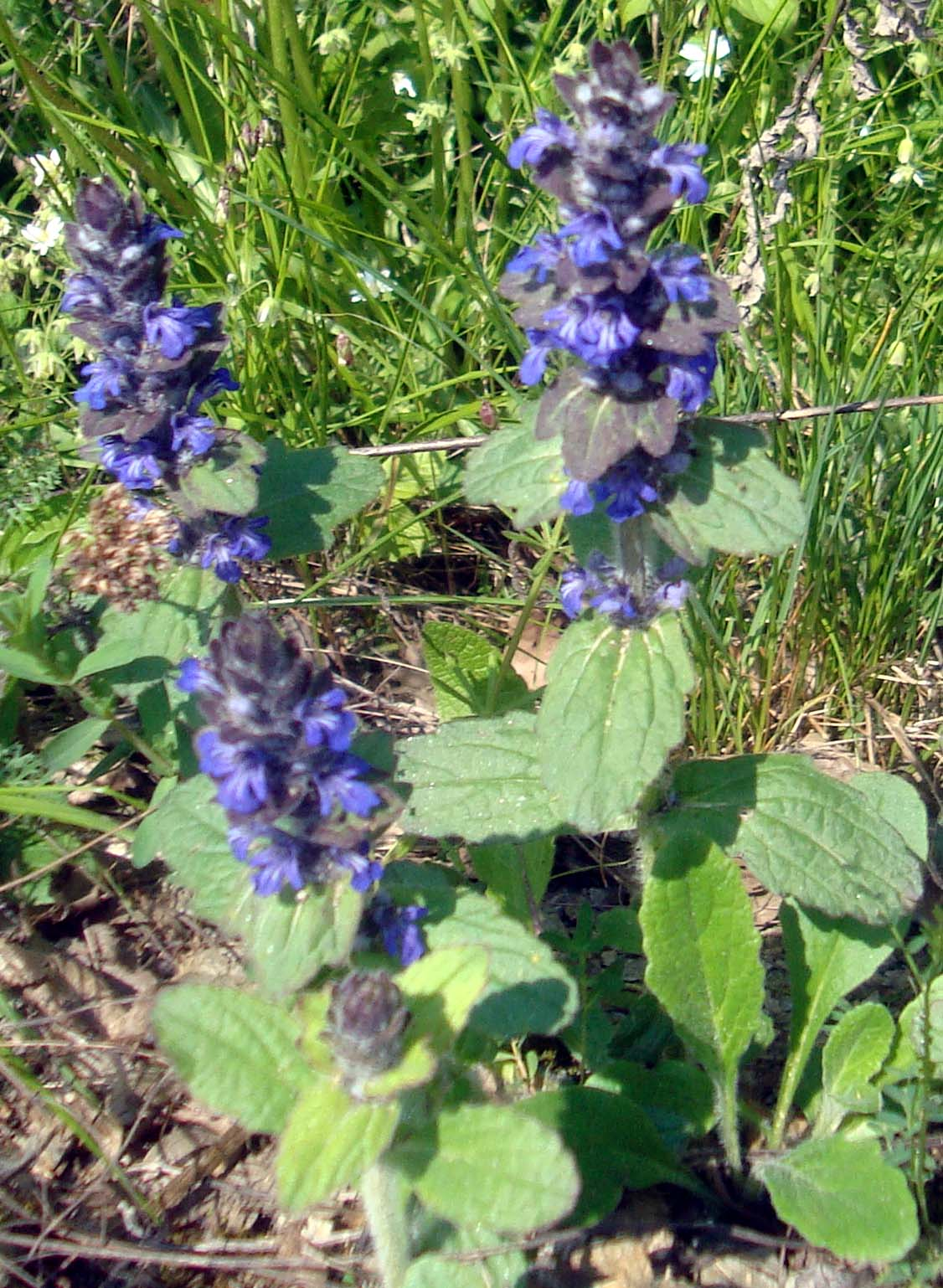 (Ajuga genevensis) z Podkomorských lesů, Česká republika, jižní Morava